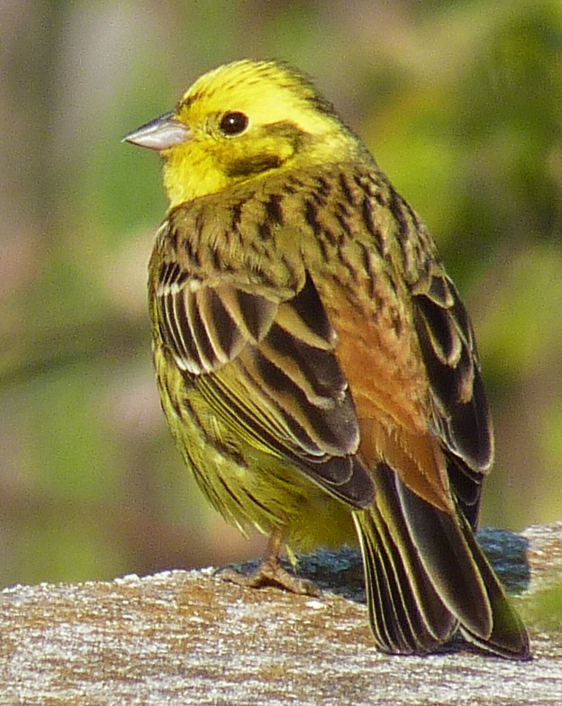 Goldammer (Emberiza citrinella)